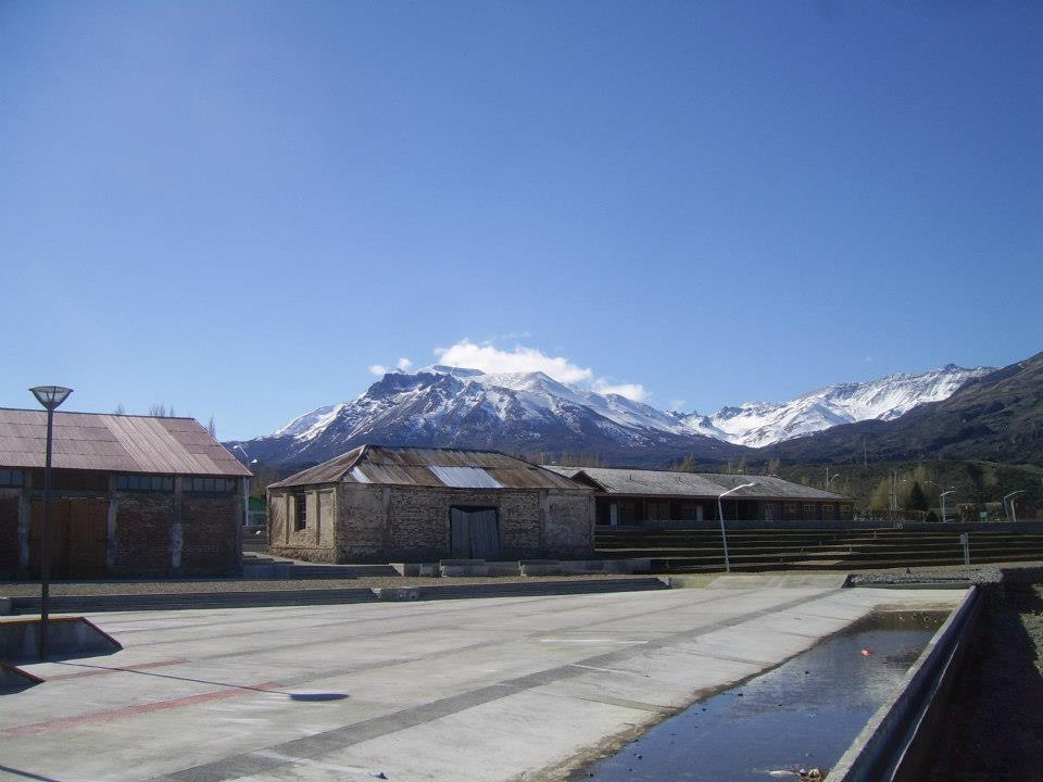 las bodegas del puerto con montaña de fondo